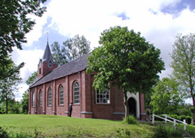 Kluizenarij Onze Lieve Vrouwe van de Besloten Tuin